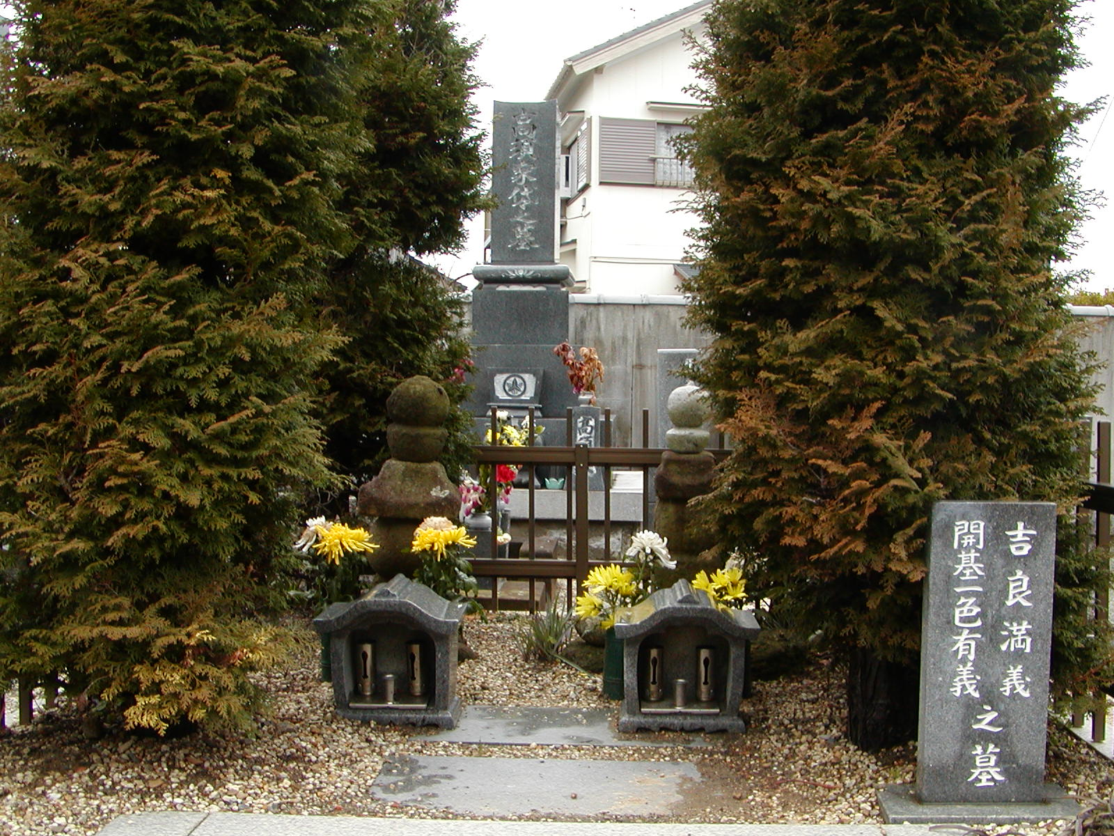 愛知県西尾市一色町安休寺 吉良満義・一色有義墓